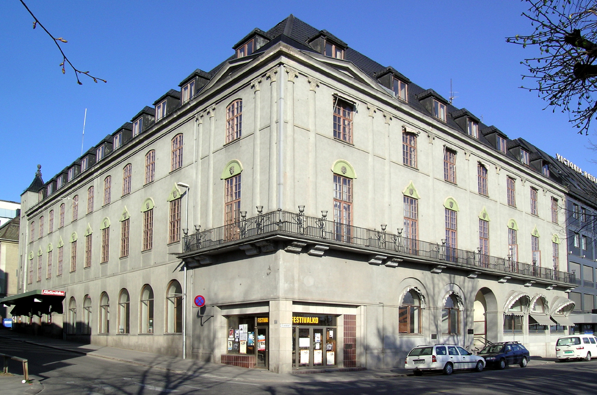 Festiviteten, Strandgata 23, Hamar. Byens tidligere rådhus, bygd 1917-1927. Arkitekt Ole Sverre. Øverste etasje er tegnet av Otto V. Juell.